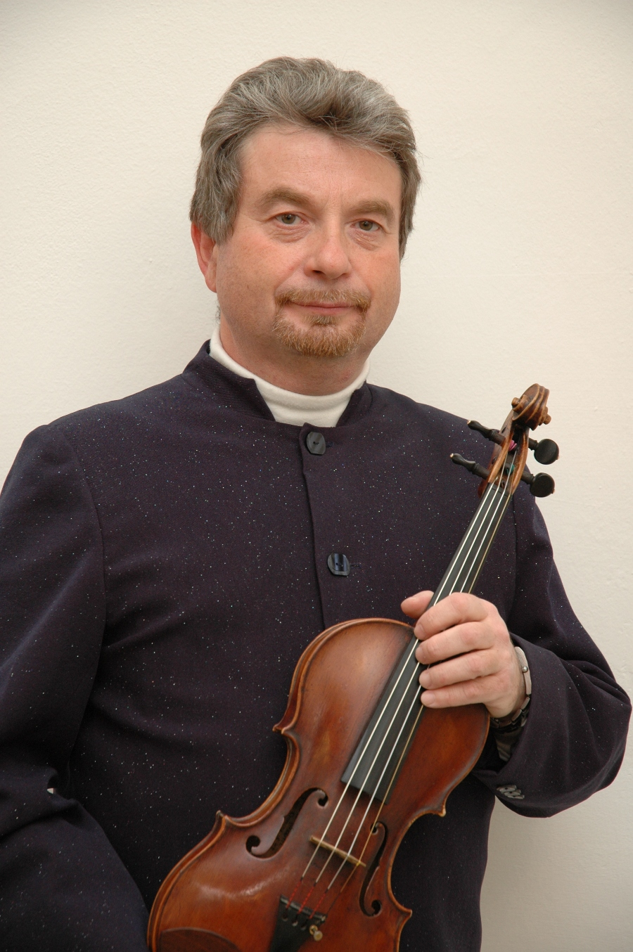 fotografie Borise Monoszona